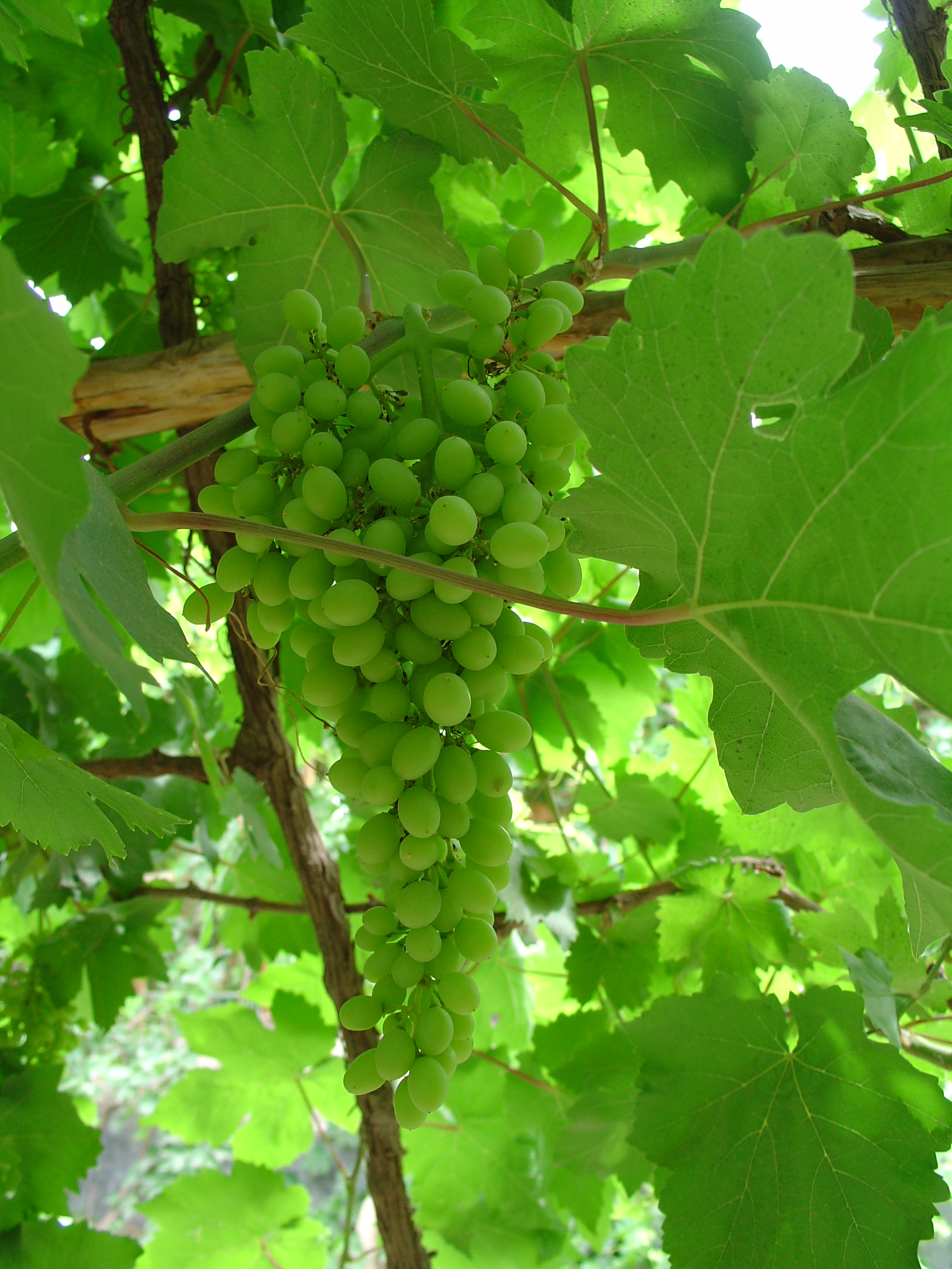 Grapes at Xin Jiang